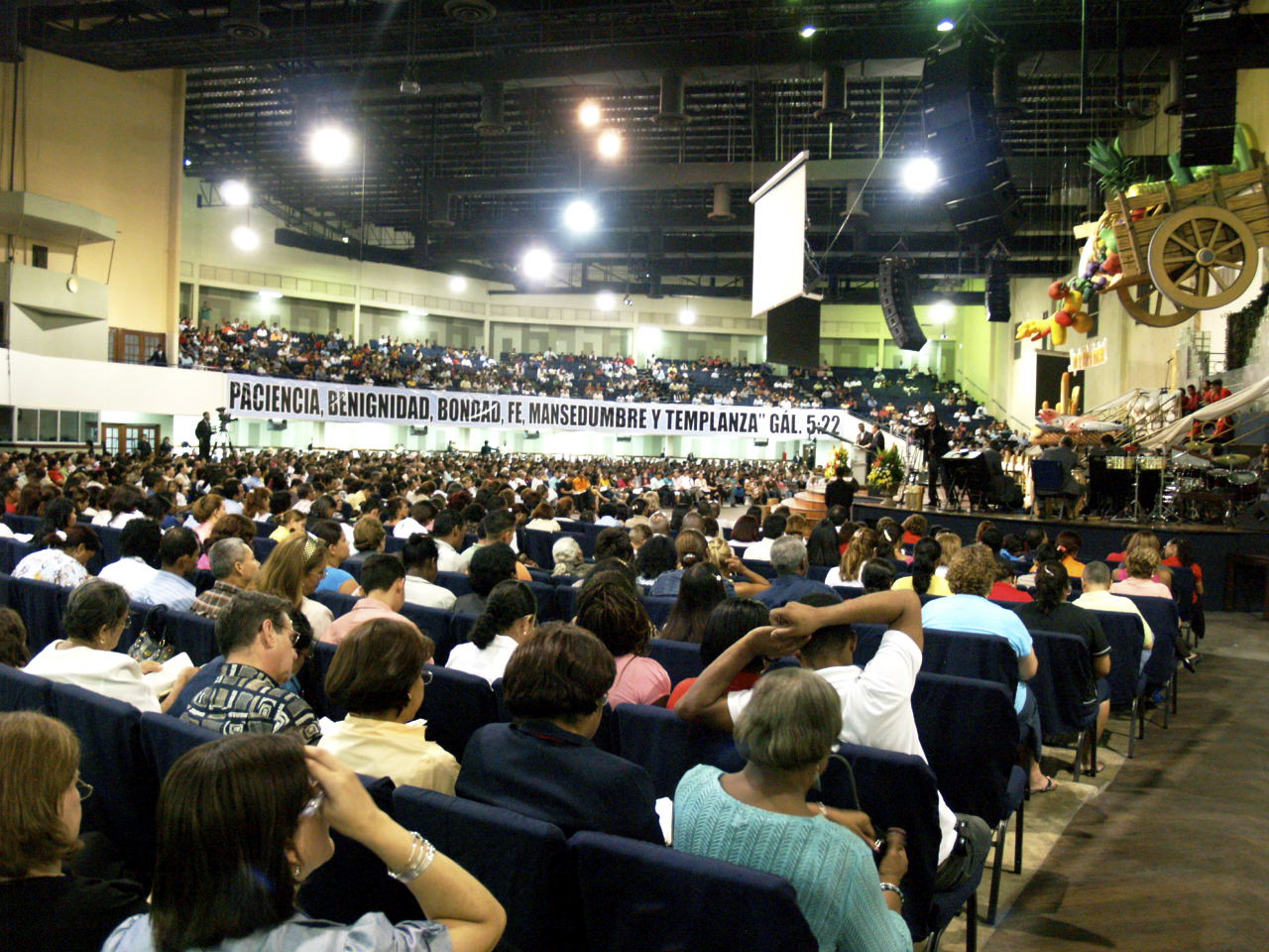 Iglesia mas grande de Panamá